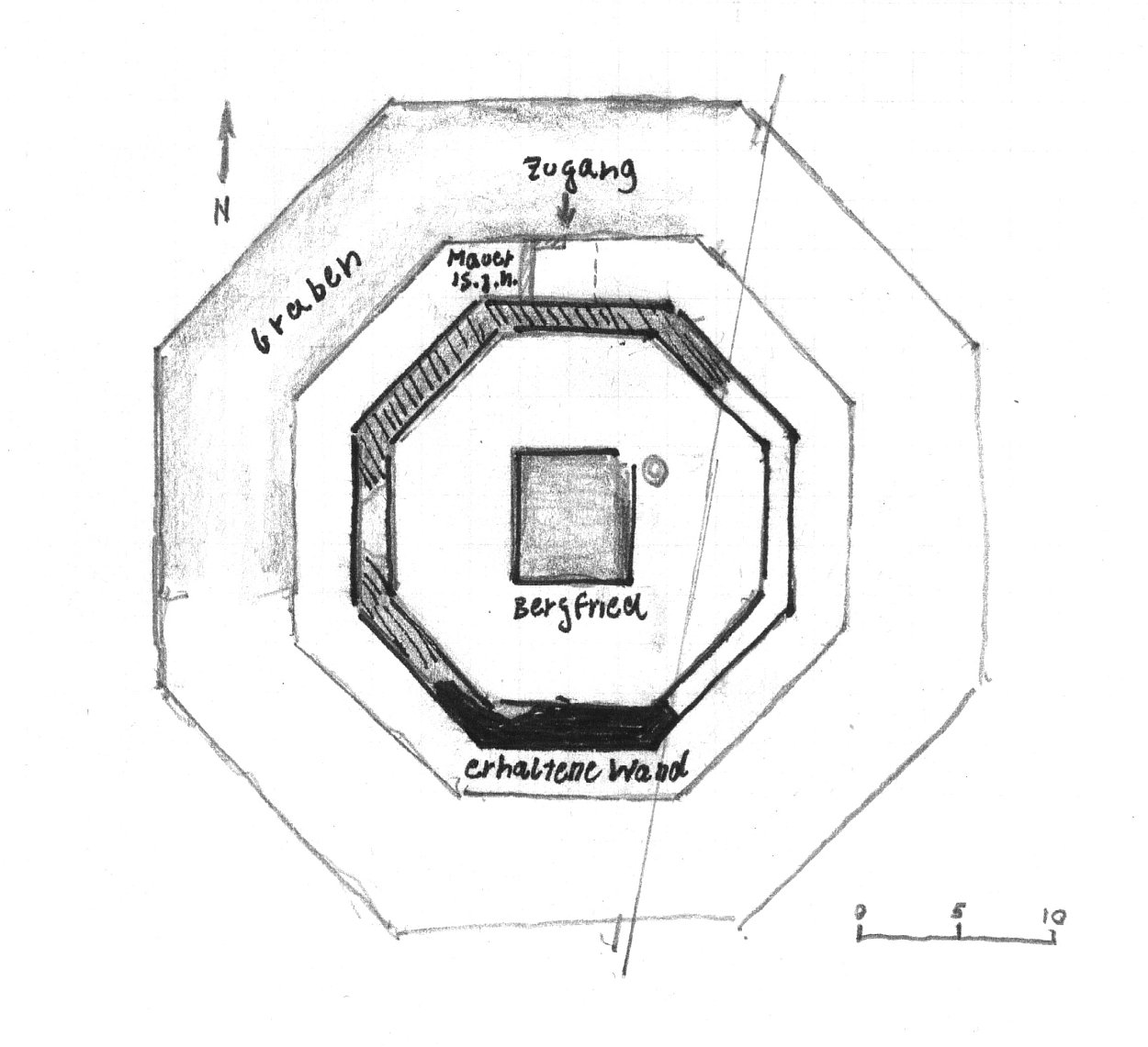 Plan du Château de Burgstall, Guebwiller